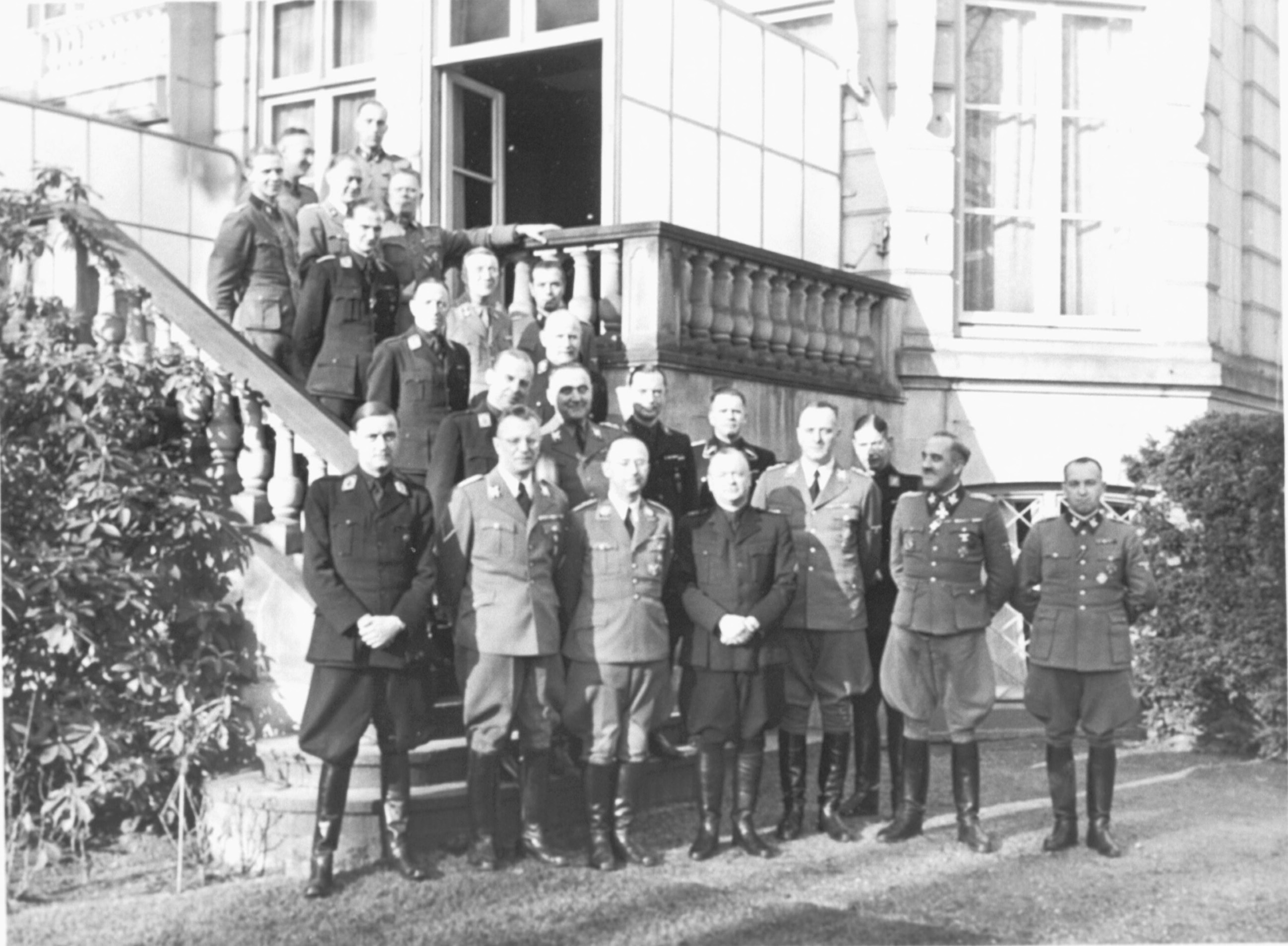 Bezoek Himmler aan Nederland. v.l.n.r. 1e rij: v. Geelkerken, Seyss-Inquart, Himmler, Mussert, Rauter, de Blocq van Schelting, Demelhuber. v.l.n.r. 2e rij: Best. G. Berger, Muller Lehning, Feldmeijer. 3e rij: Huygen, Willi Ritterbusch, Harster, Müller. Geheel rechts Erich Naumann, de derde Befehlshaber der Sicherheitspolizei und des SD in Nederland. Deze foto is afkomstig uit het archief van de Fotodienst der NSB.